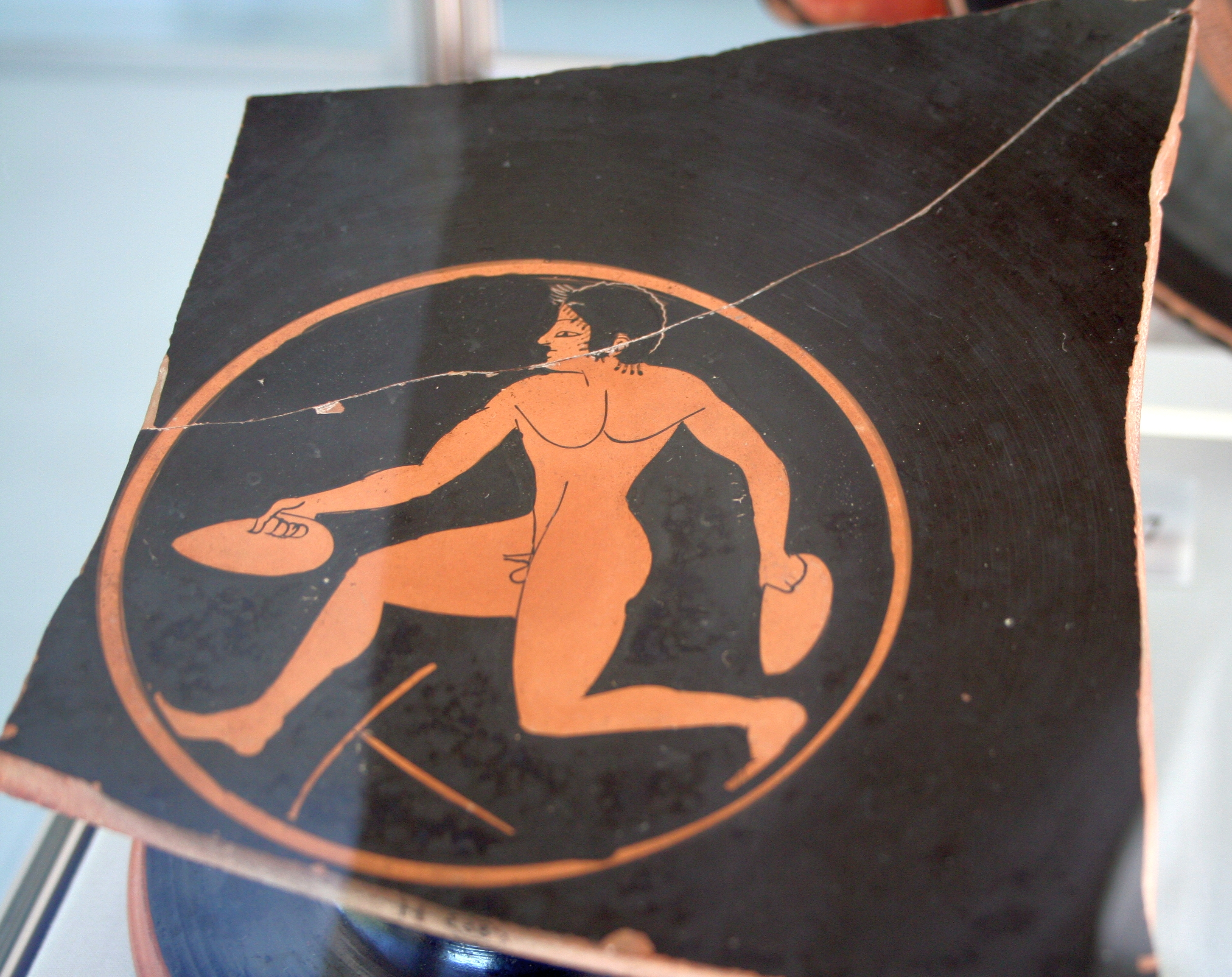 Antikenmuseum der Universität Heidelberg